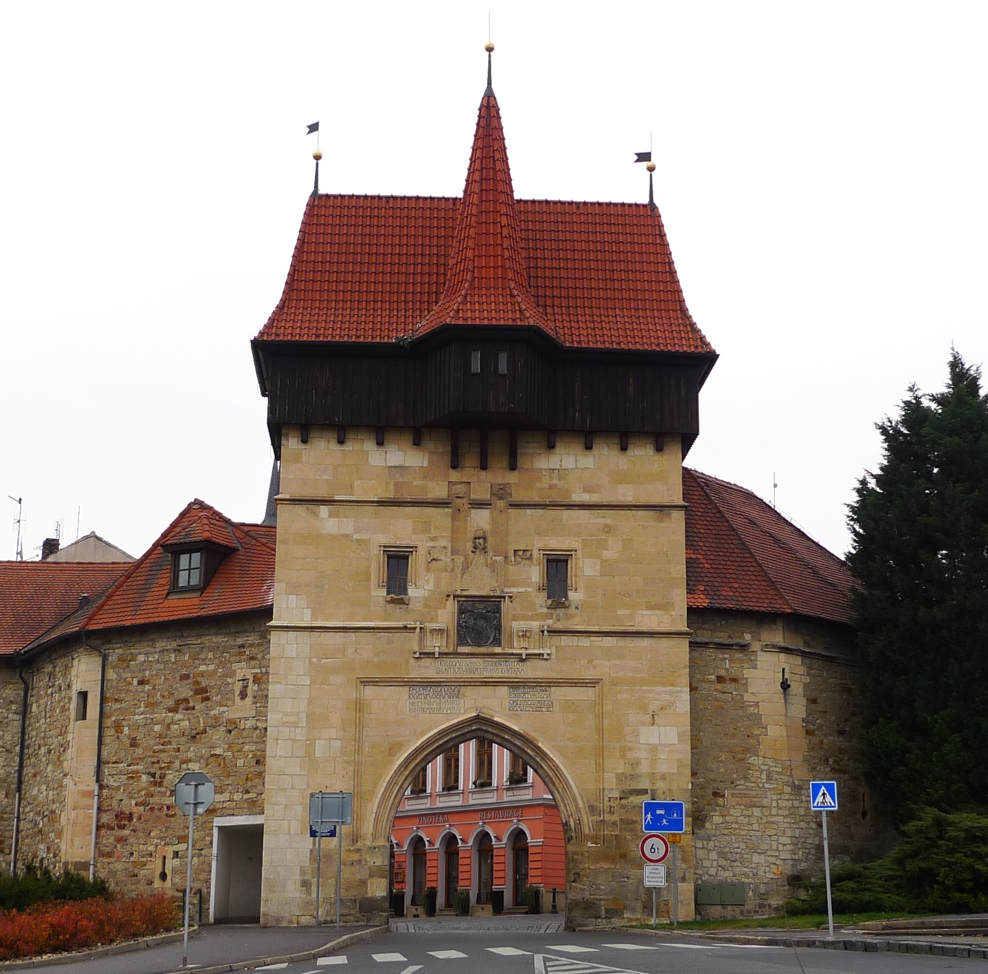 Městské opevnění (Louny), Louny